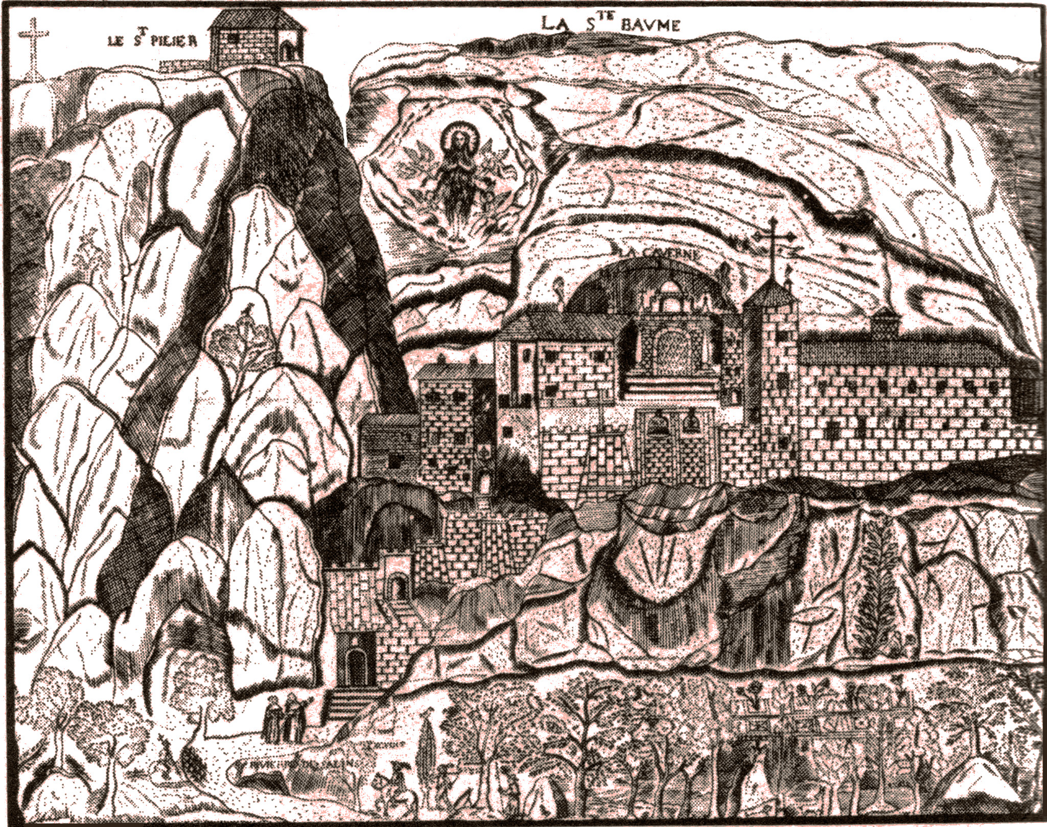 abbaye royale et massif de la Sainte Baume